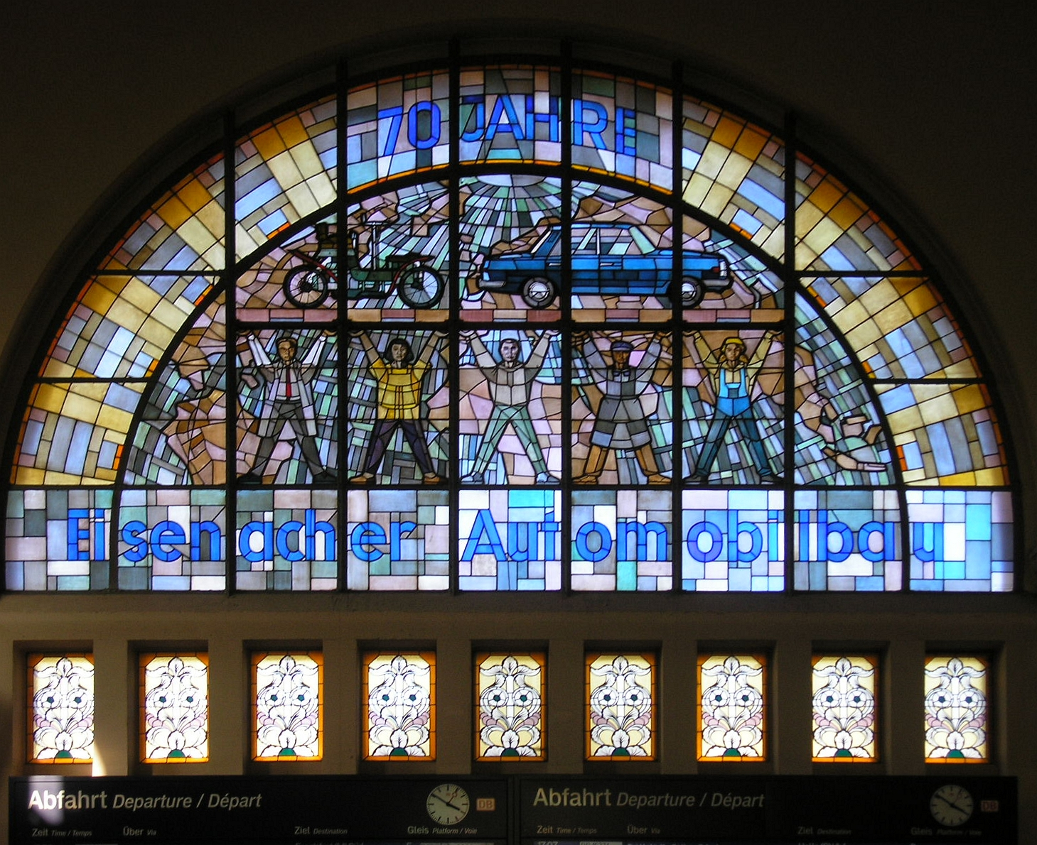 Das Glasmosaik im Nordfenster der Bahnhofshalle in Eisenach. Es zeigt das Automobilwerk Eisenach.